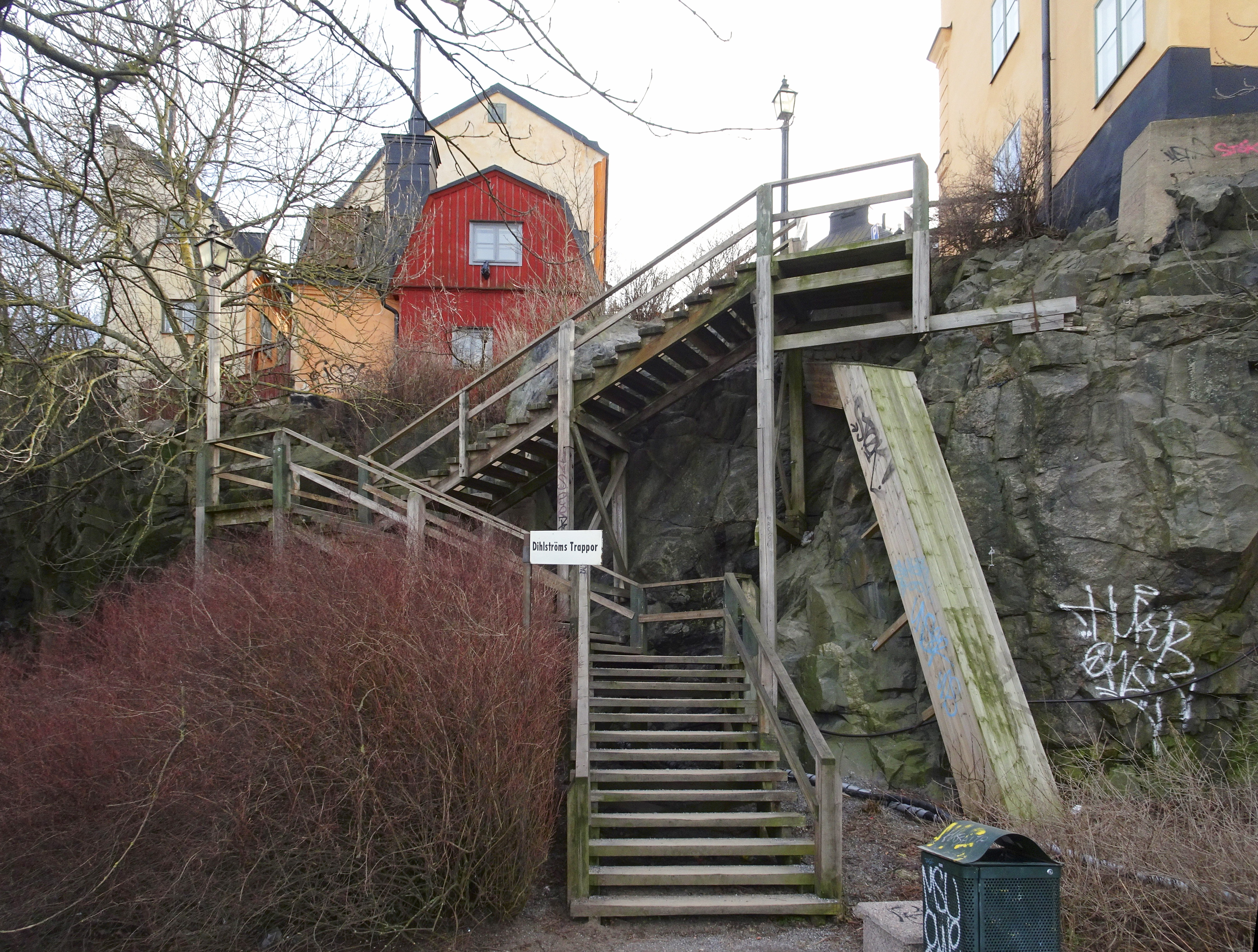 Dihlströms trappor mellan Nytorgsgatan och Katarinavägen